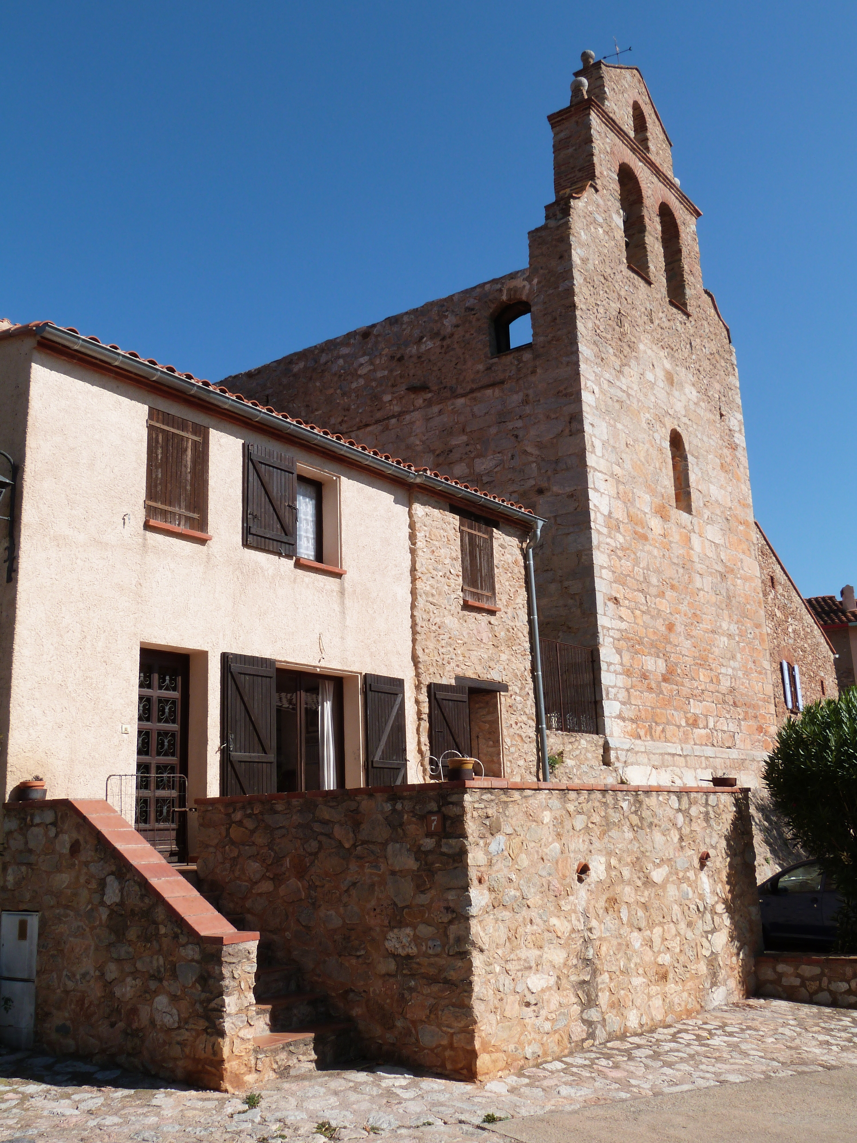 Eglise et maisons formant une partie de la cellera de Sainte-Colombe-de-la-Commanderie